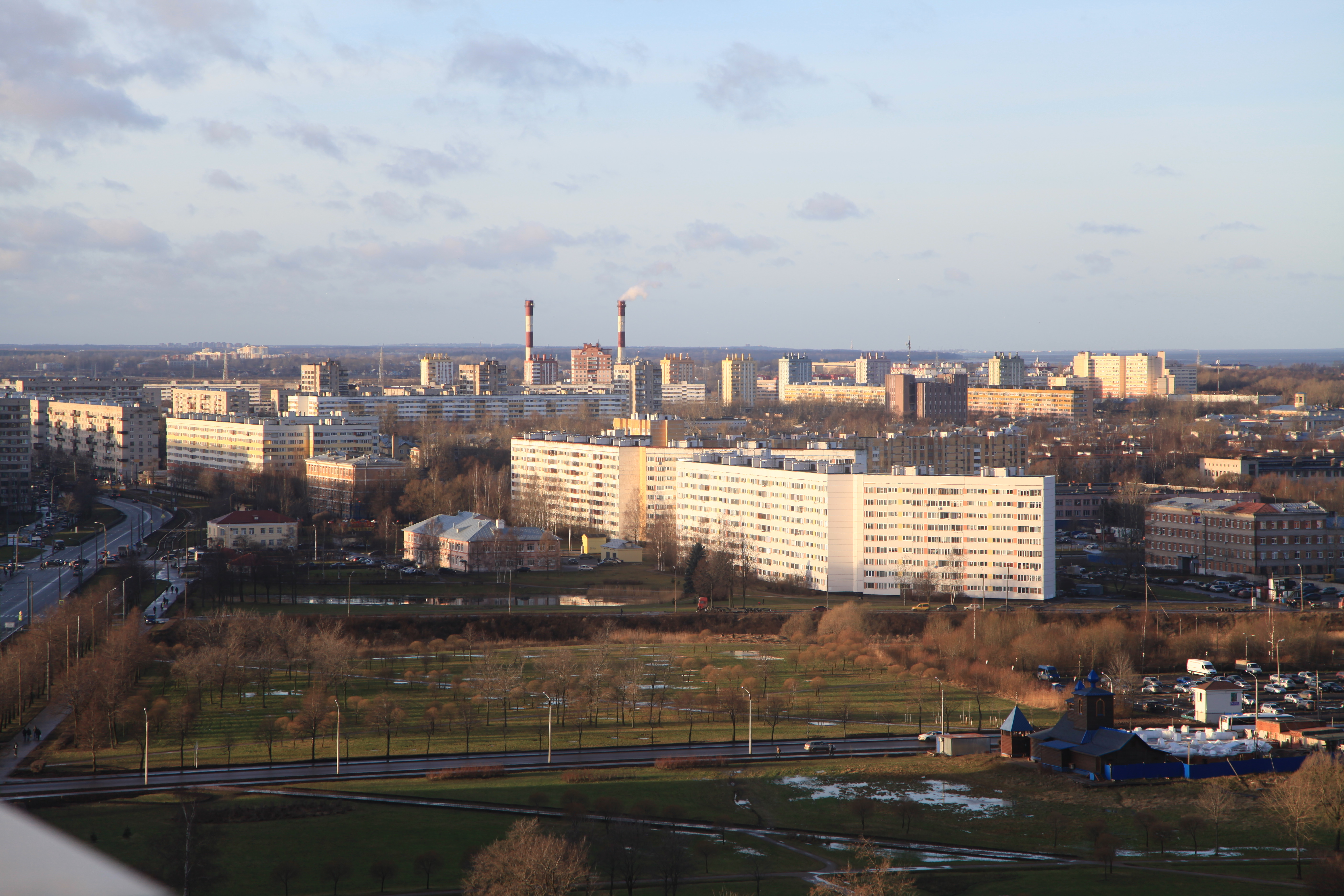 Сосновая Поляна